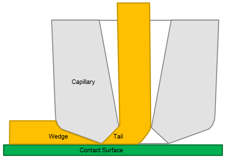 Sectional view of bonding capillary to show wedge- and tailbond.